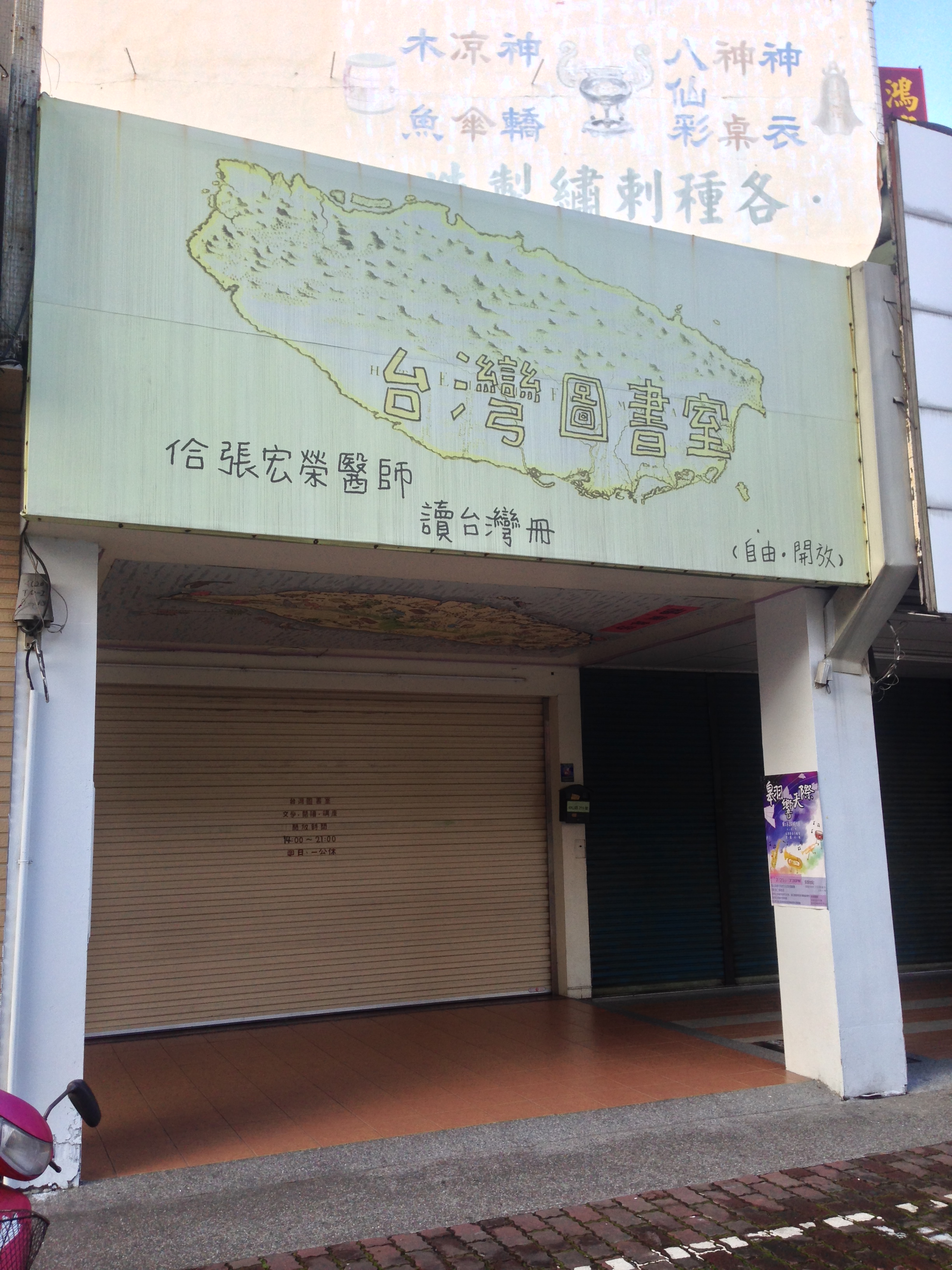 中文（台灣）: 台灣圖書室，位於嘉義市東區中山路255號。